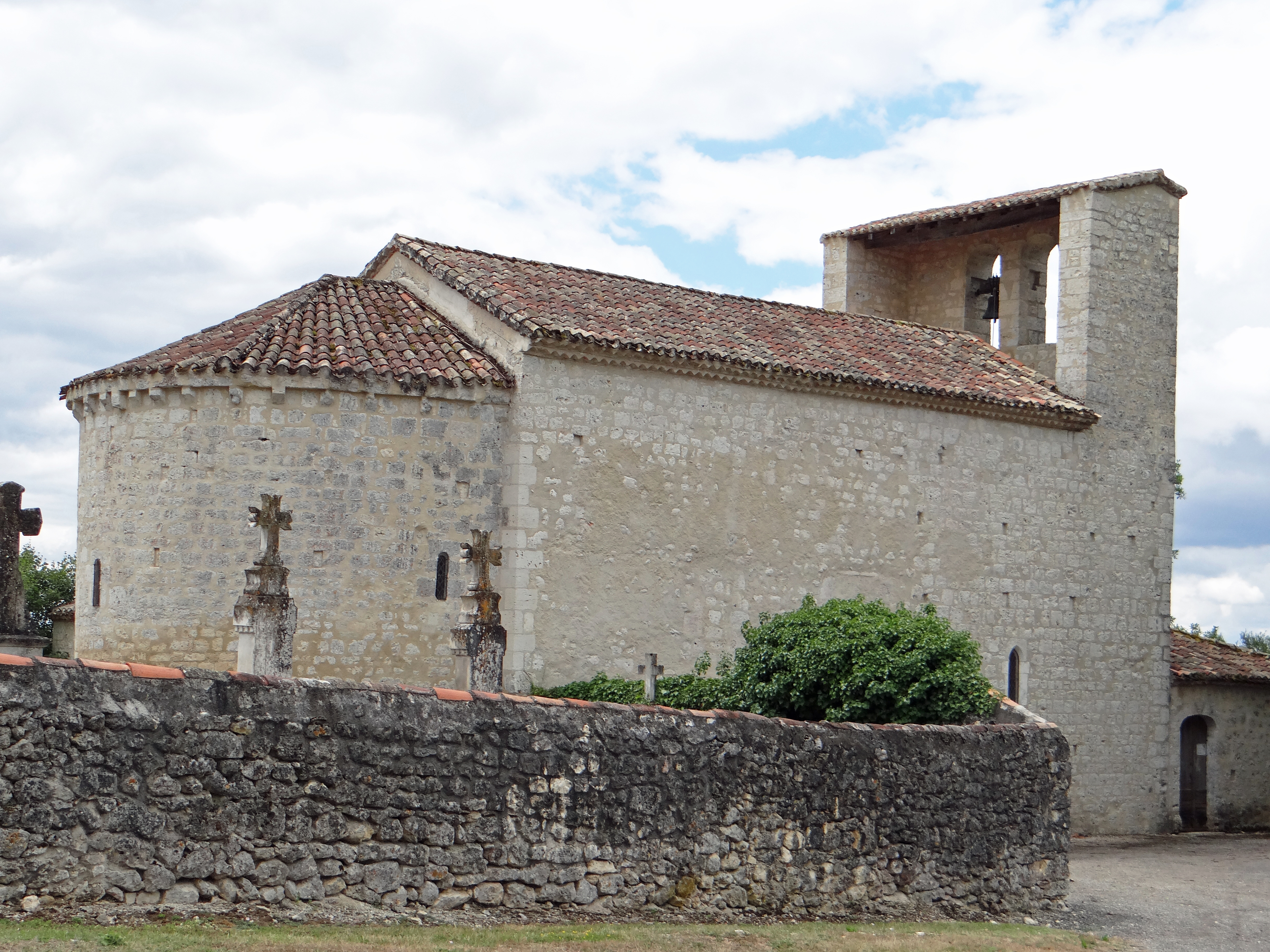 Massels - Église Sainte-Quitterie